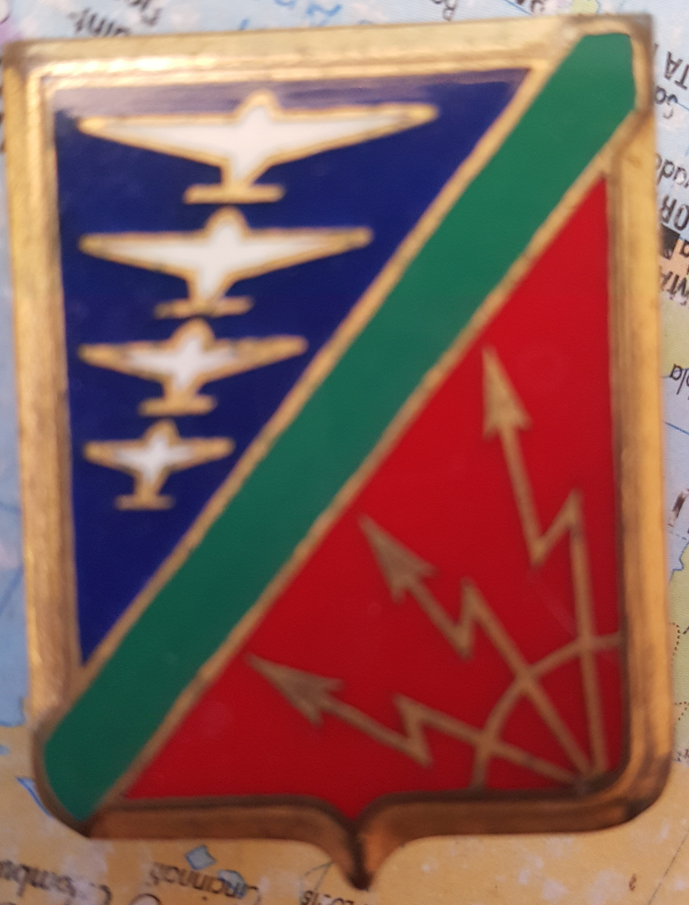 Insigne à épingler sur la Tenue militaire, acheté lors de mon Service Militaire Classe 74/10.